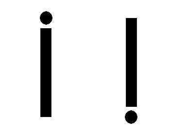 Imagen de los signos de exclamación